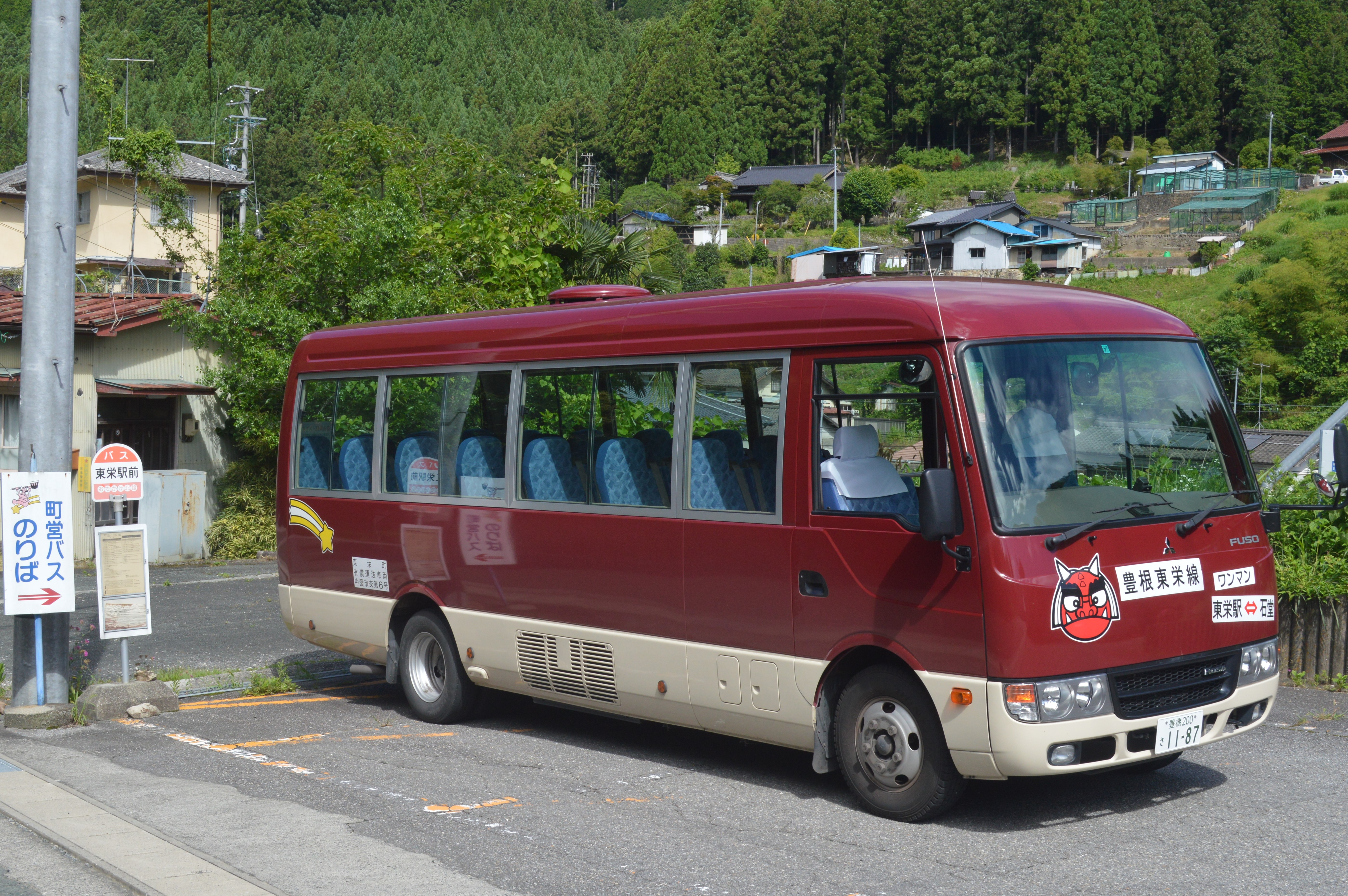 愛知県北設楽郡で運行されているおでかけ北設に用いられているバス。JR飯田線東栄駅前バス停で撮影。